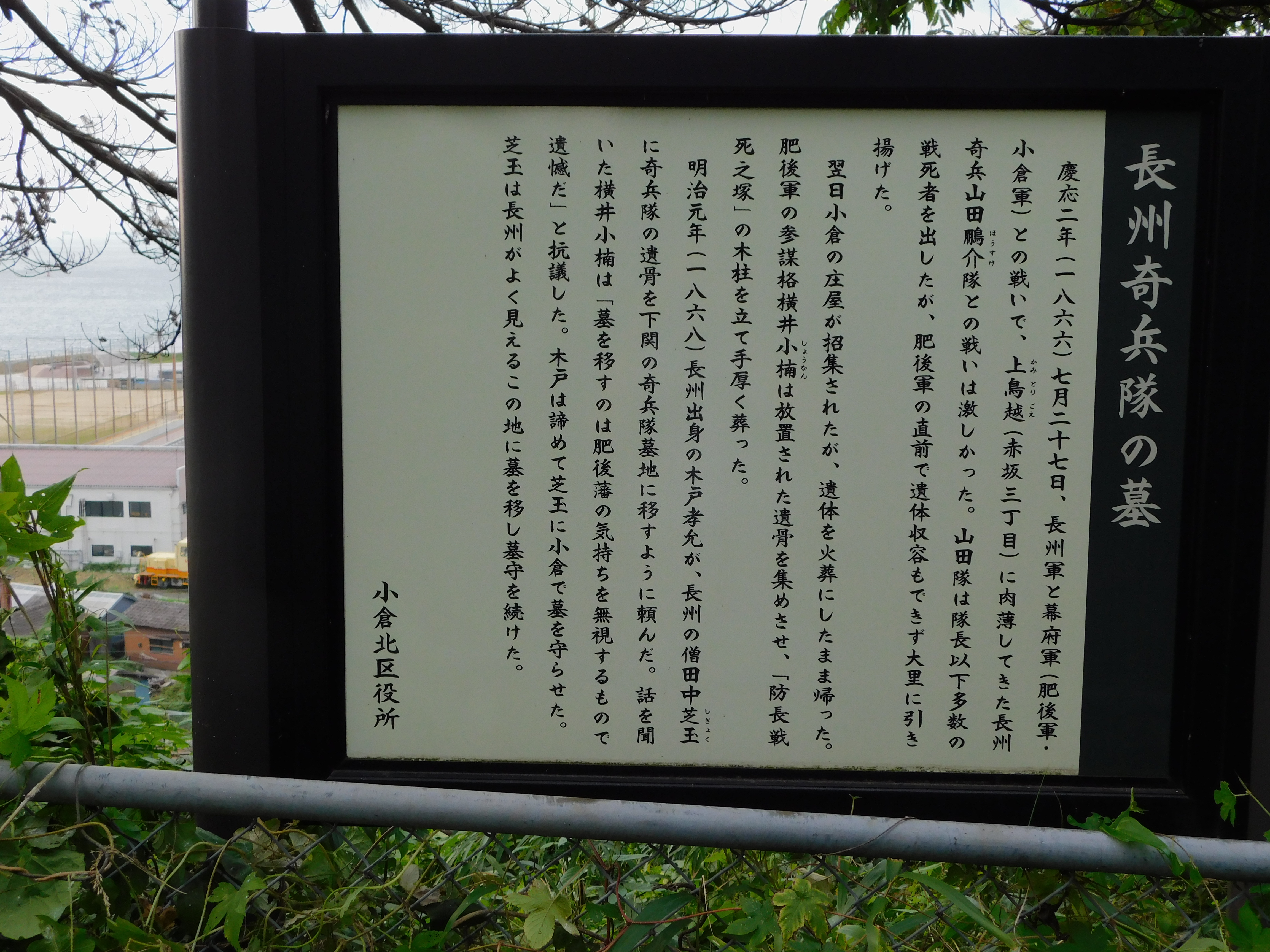 2019年７月23日撮影。